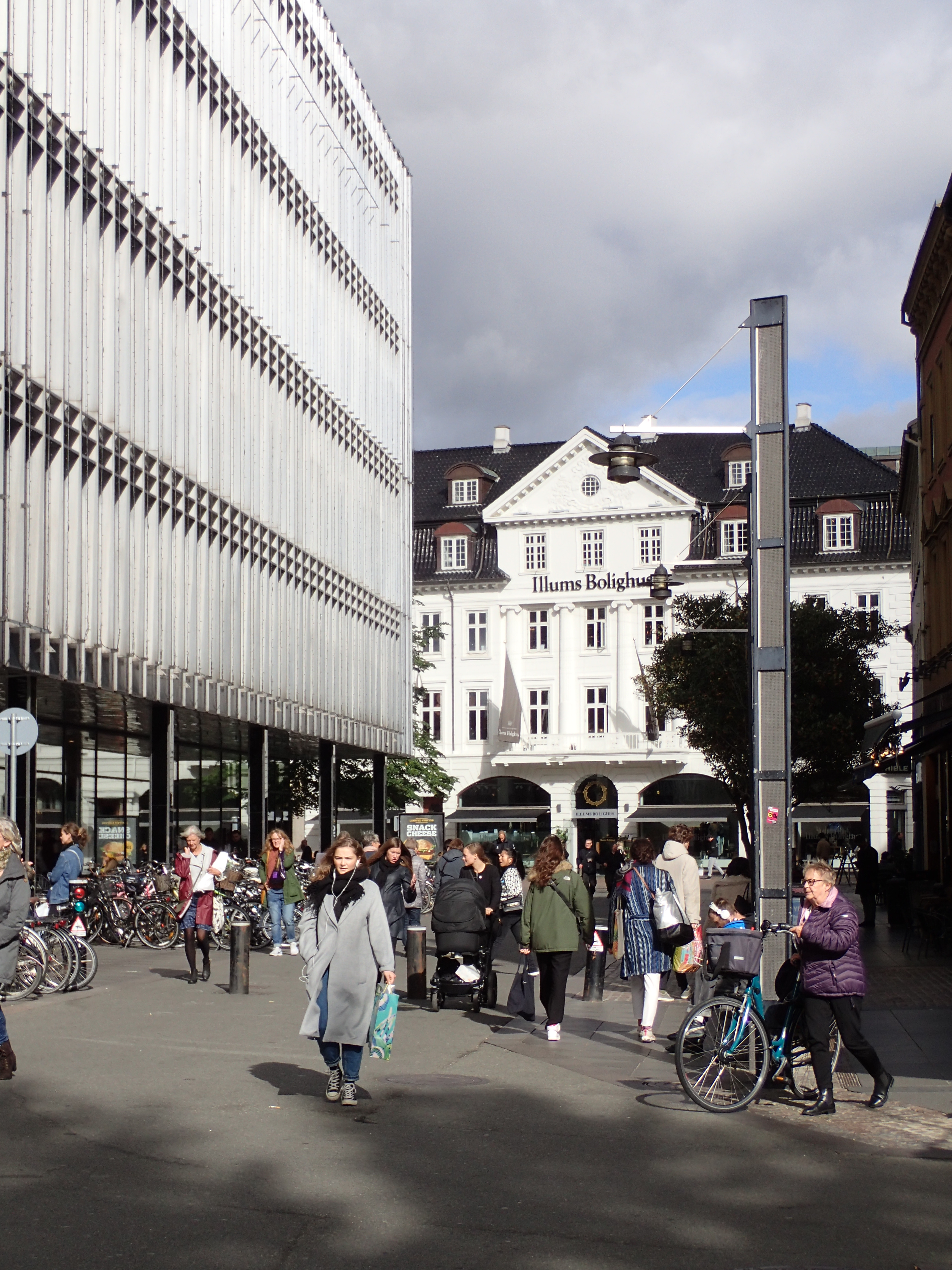 Immervad i Aarhus.